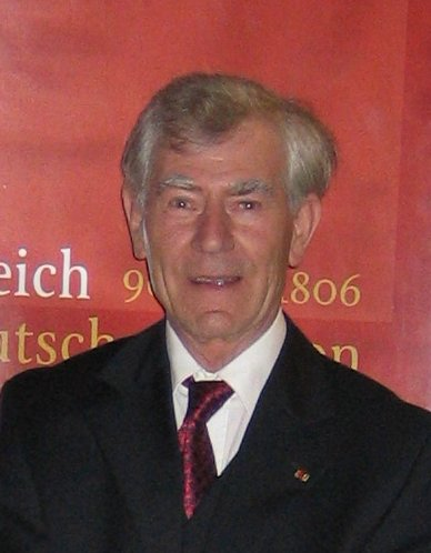 Porträt von Prof. Dr. Wolfgang Spindler